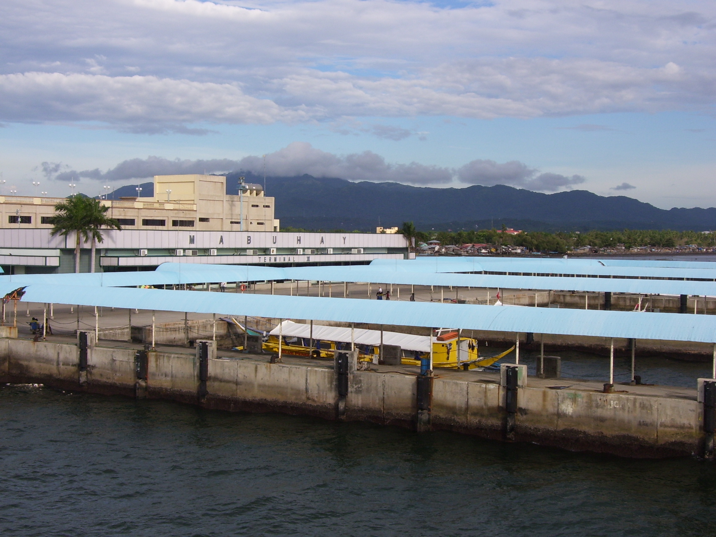 Batangas Pier